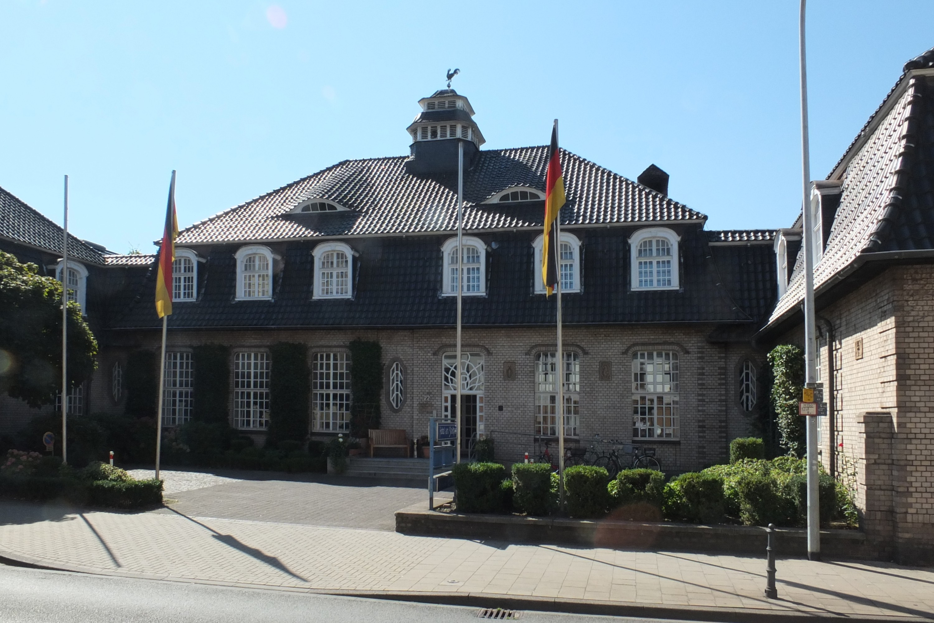 Hotel am Stadtpark, früher Hauptverwaltung der Paul-Spindler-Werke, Hilden, Klotzstraße 22, Baujahr 1910, Architekt: Walter FurthmannThis is a photograph of an architectural monument.